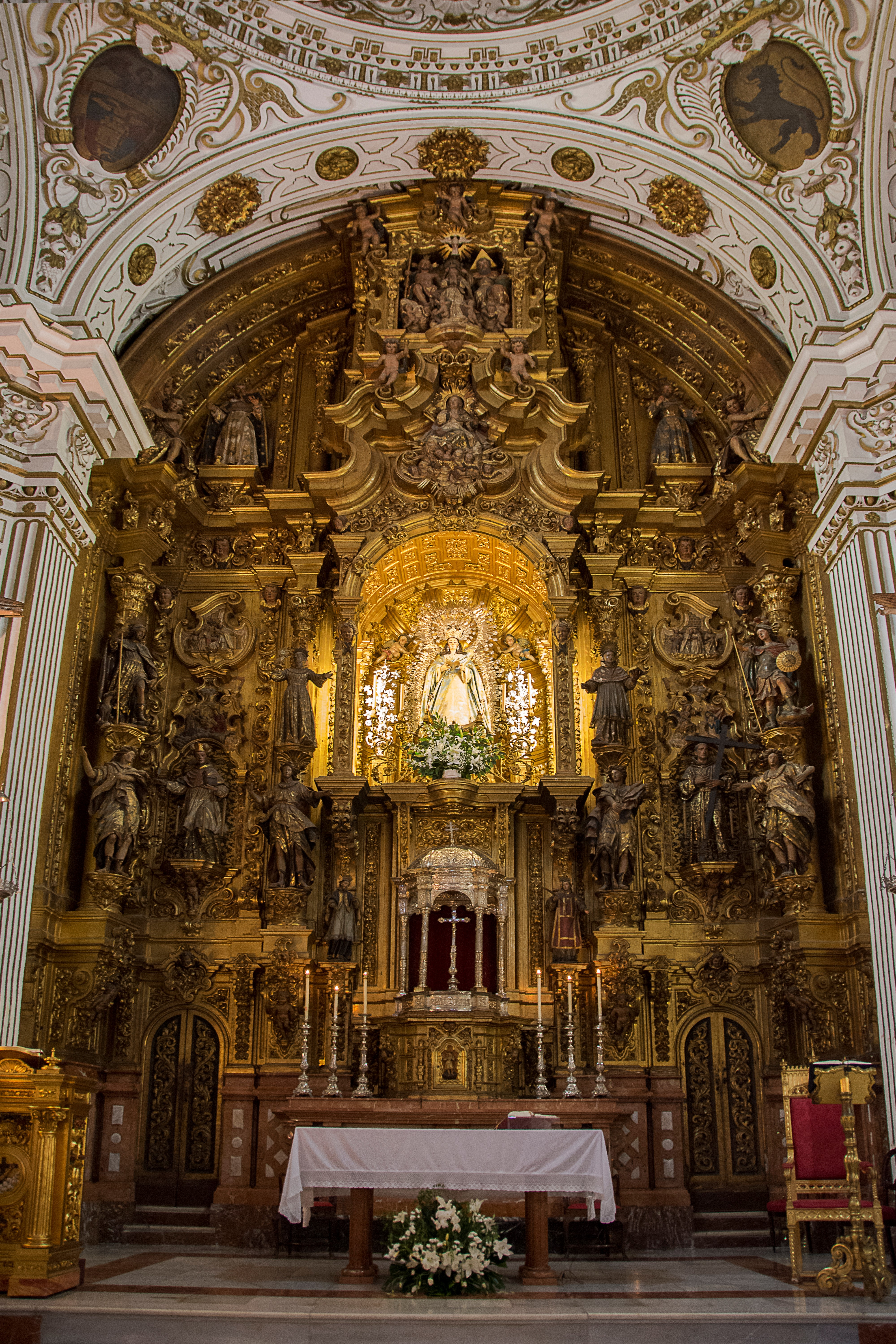 Iglesia de San Buenaventura. Sevilla, España